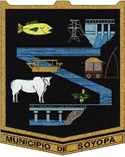 Soyopa címere